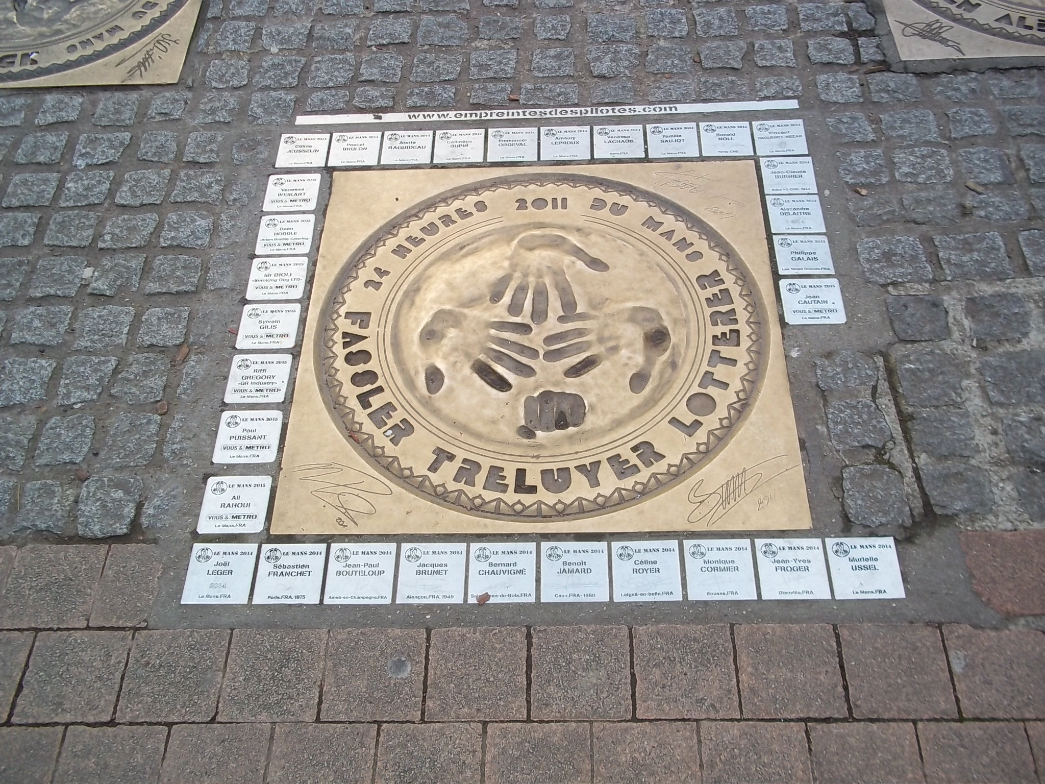 Plaque de bronze des empreintes des vainqueurs des 24 heures 2011